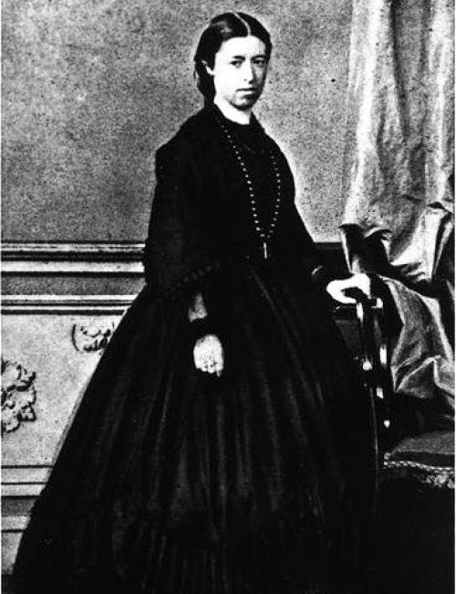 Portrait de Léonie de Waha. Photo extraite de E. LAMBOTTE, Une grande wallonne, Léonie de Waha de Chestret, 1836-1926. 1927. p.46